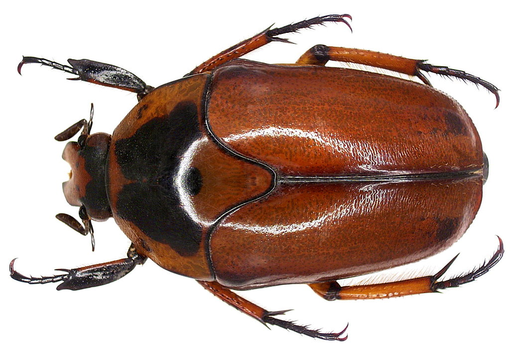 Familie: Scarabaeidae Grösse: 29 mm Fundort: Indonesien, Irian Jaya, Manokwari, Mt. Arfak leg. 2007; det. A.Skale Foto: U.Schmidt, 2007